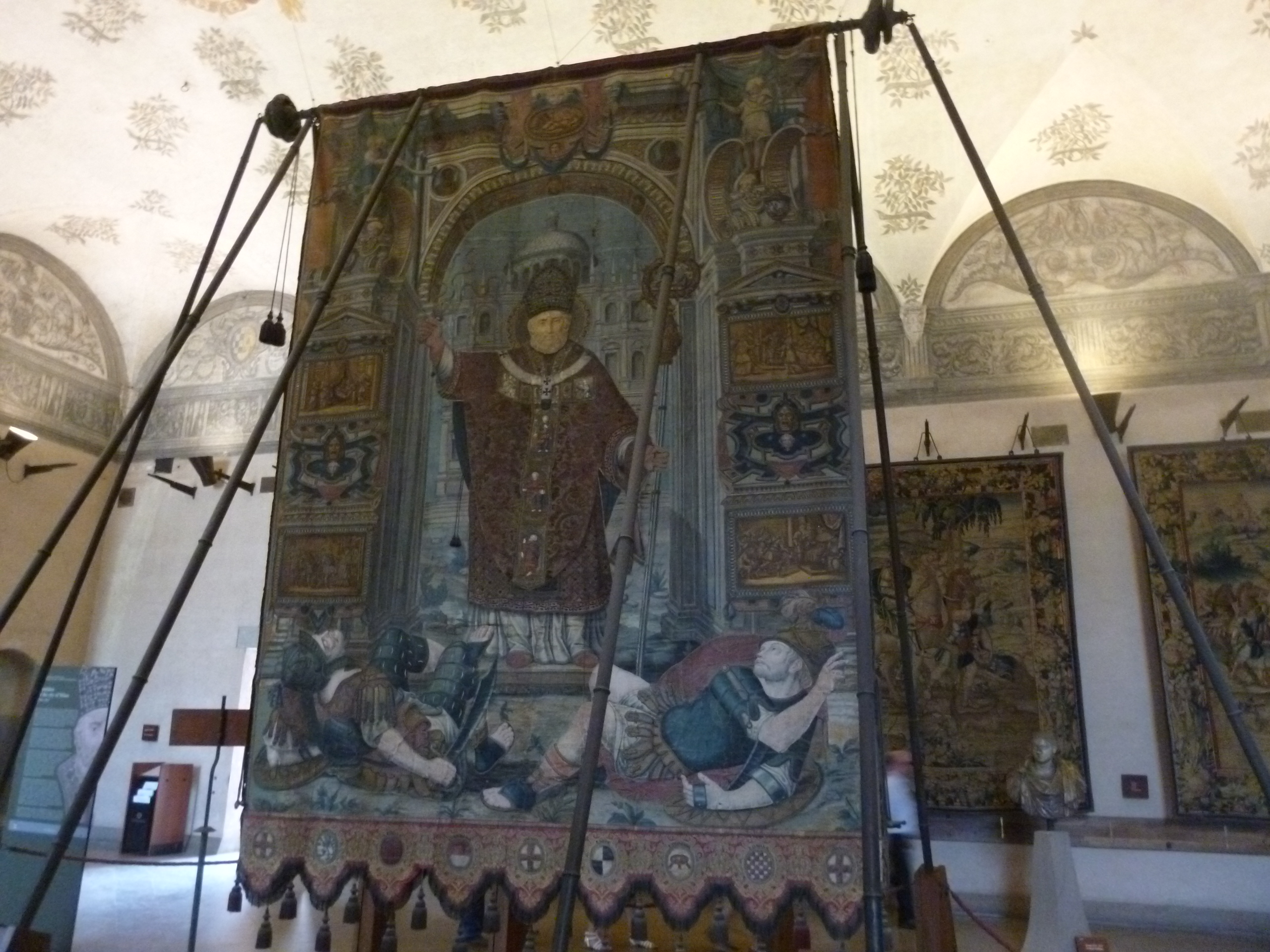 Museo d'Arte Antica This is a photo of a monument which is part of cultural heritage of Italy.